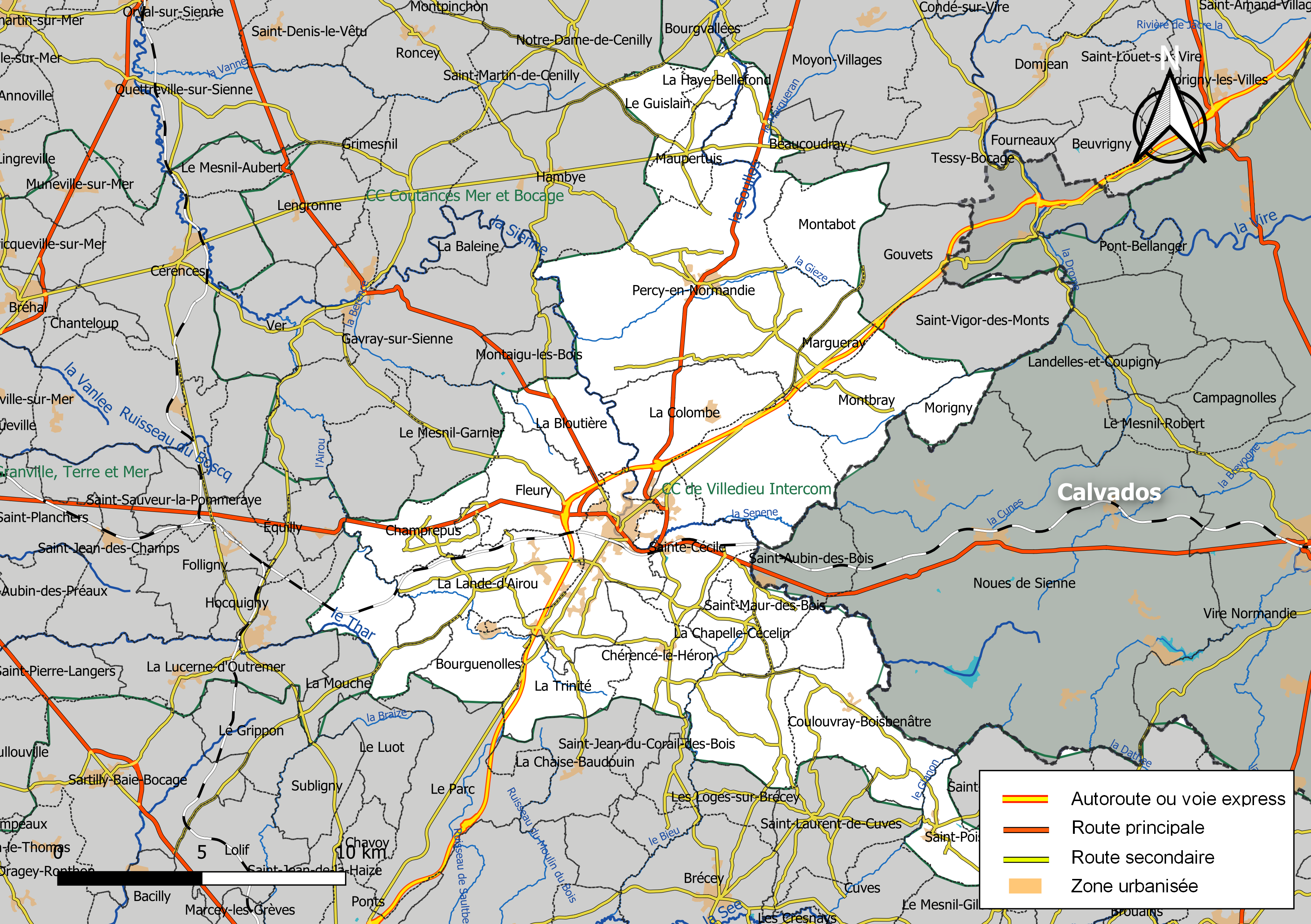 Carte géographique de l'intercommunalité Villedieu Intercom, département de la Manche, France. Composition au 1er janvier 2019.